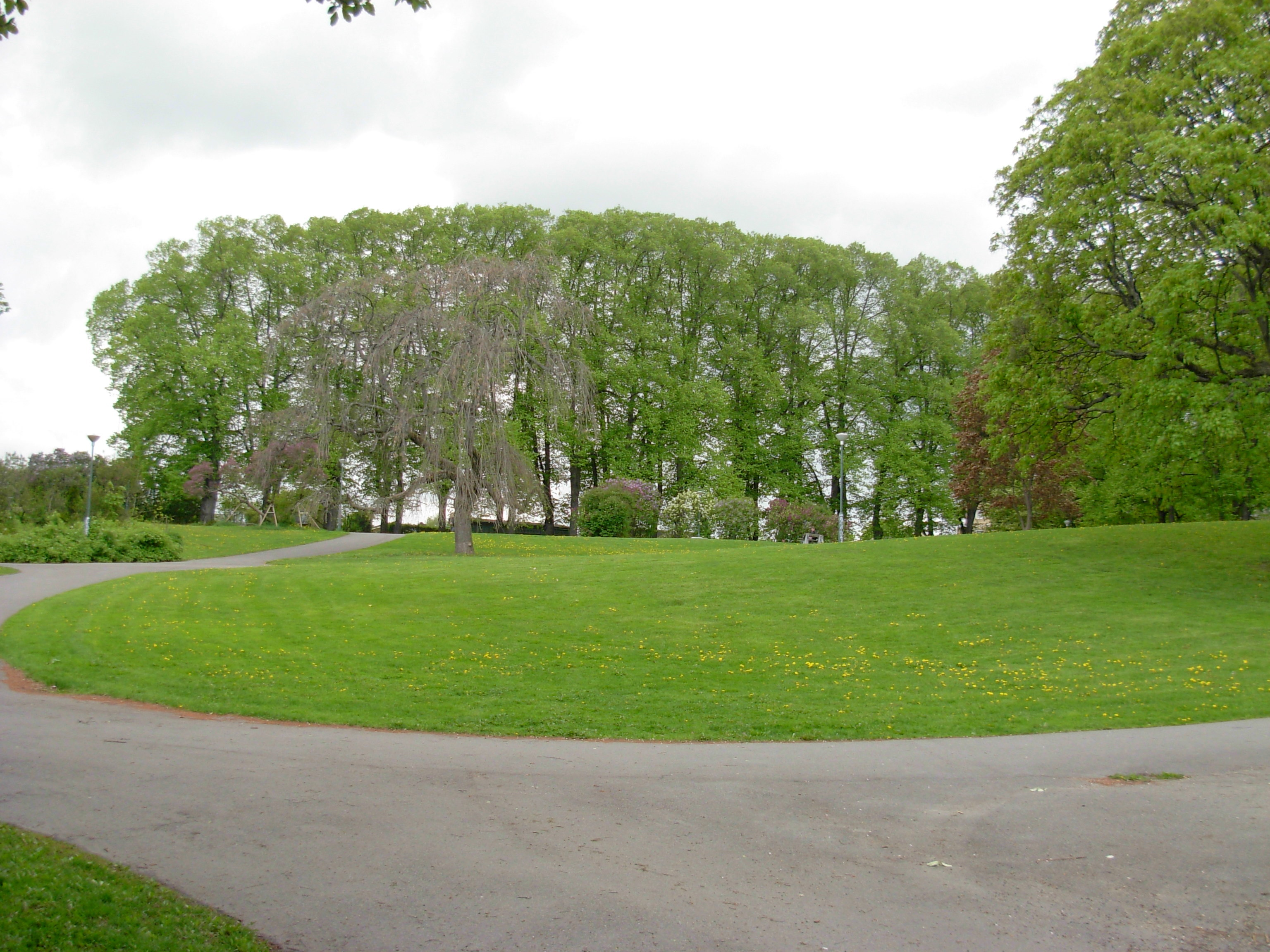 Bjølsenparken, Bjølsen, Oslo